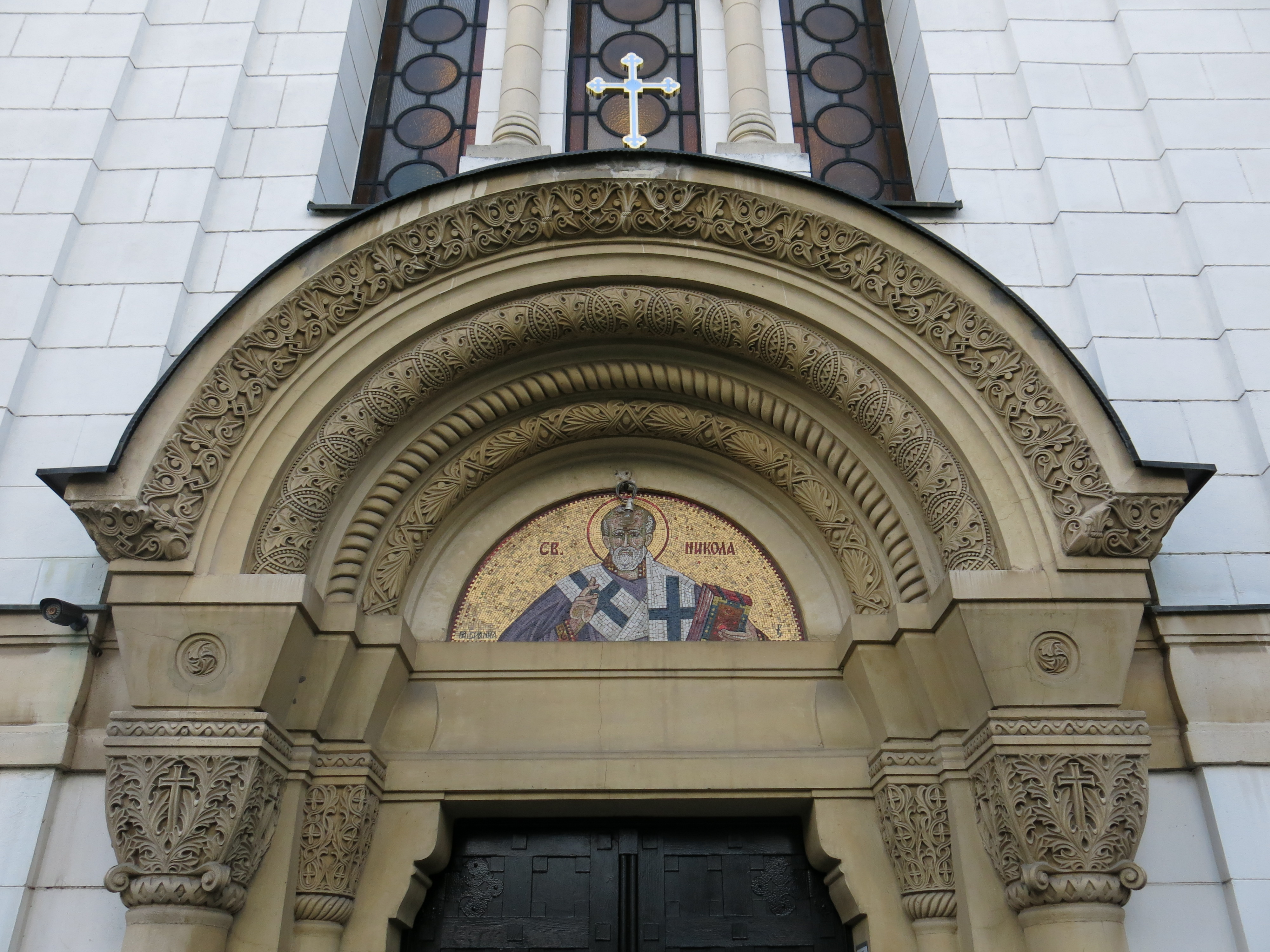 Манастир Ваведење Пресвете Богородице